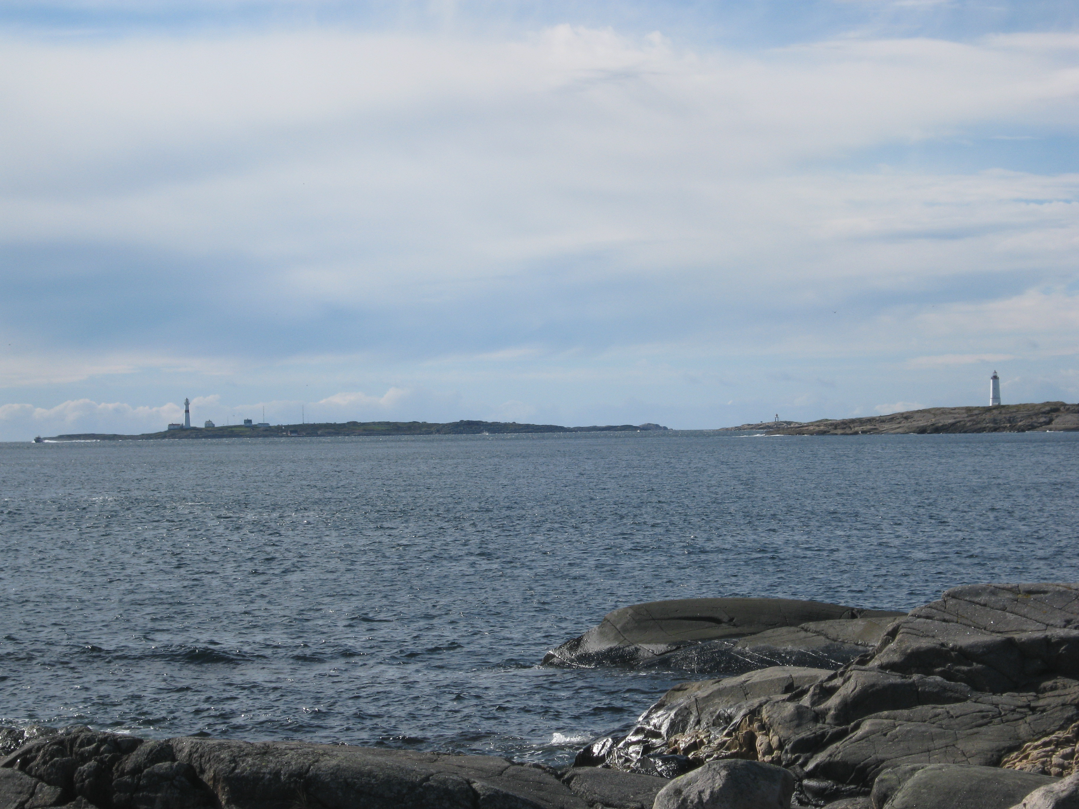 Store (tv) og Lille (th) Torungen fyr utenfor Arendal. Bilde tatt mot vest